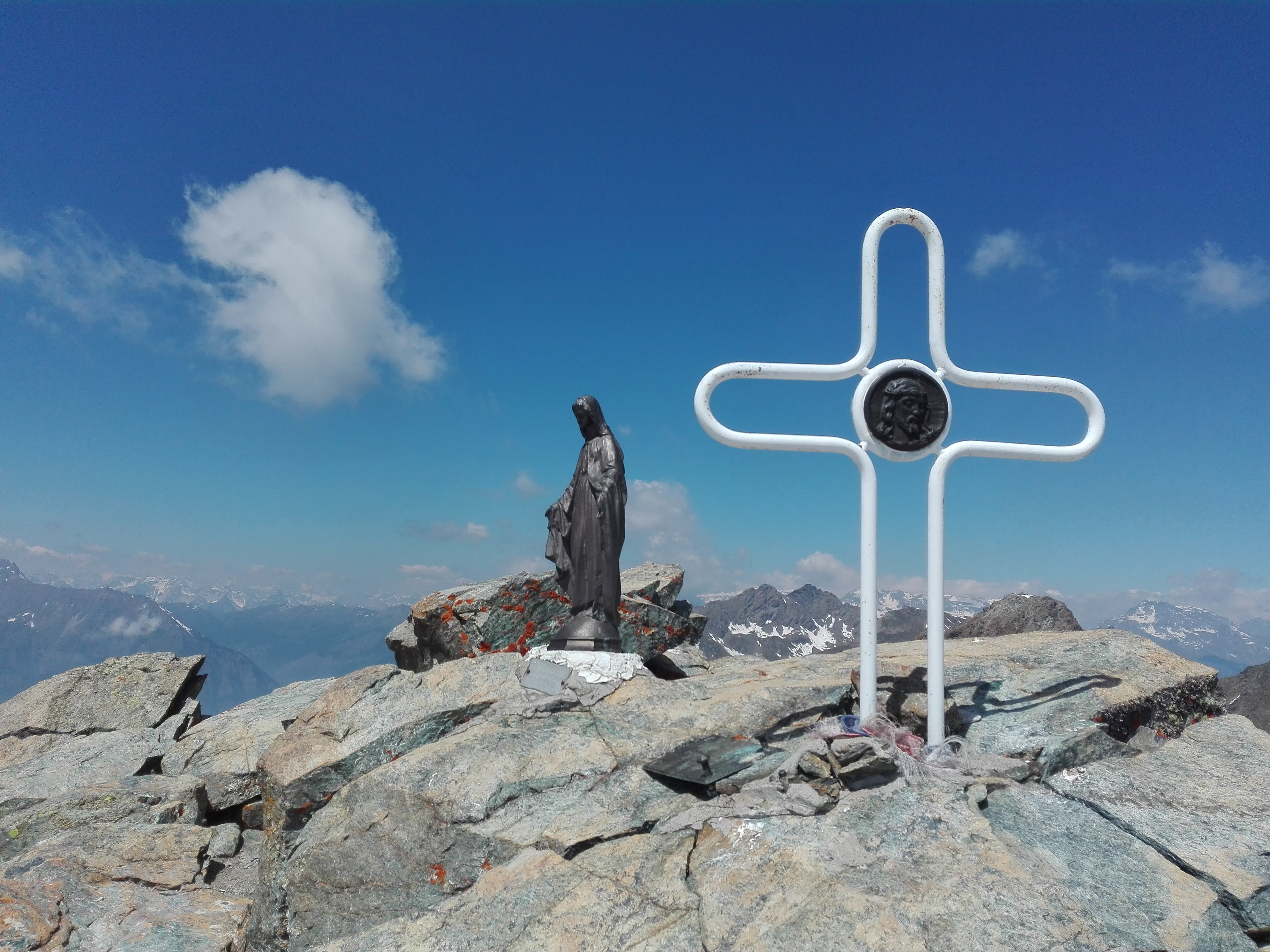 Vetta del monte Rocciavrè - Alpi Cozie